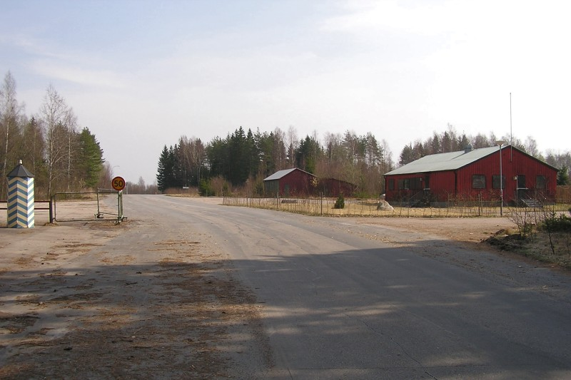 Infarten till Uråsa flygfält i april 2009. Till höger huset som var bastroppens förläggning/kontor.